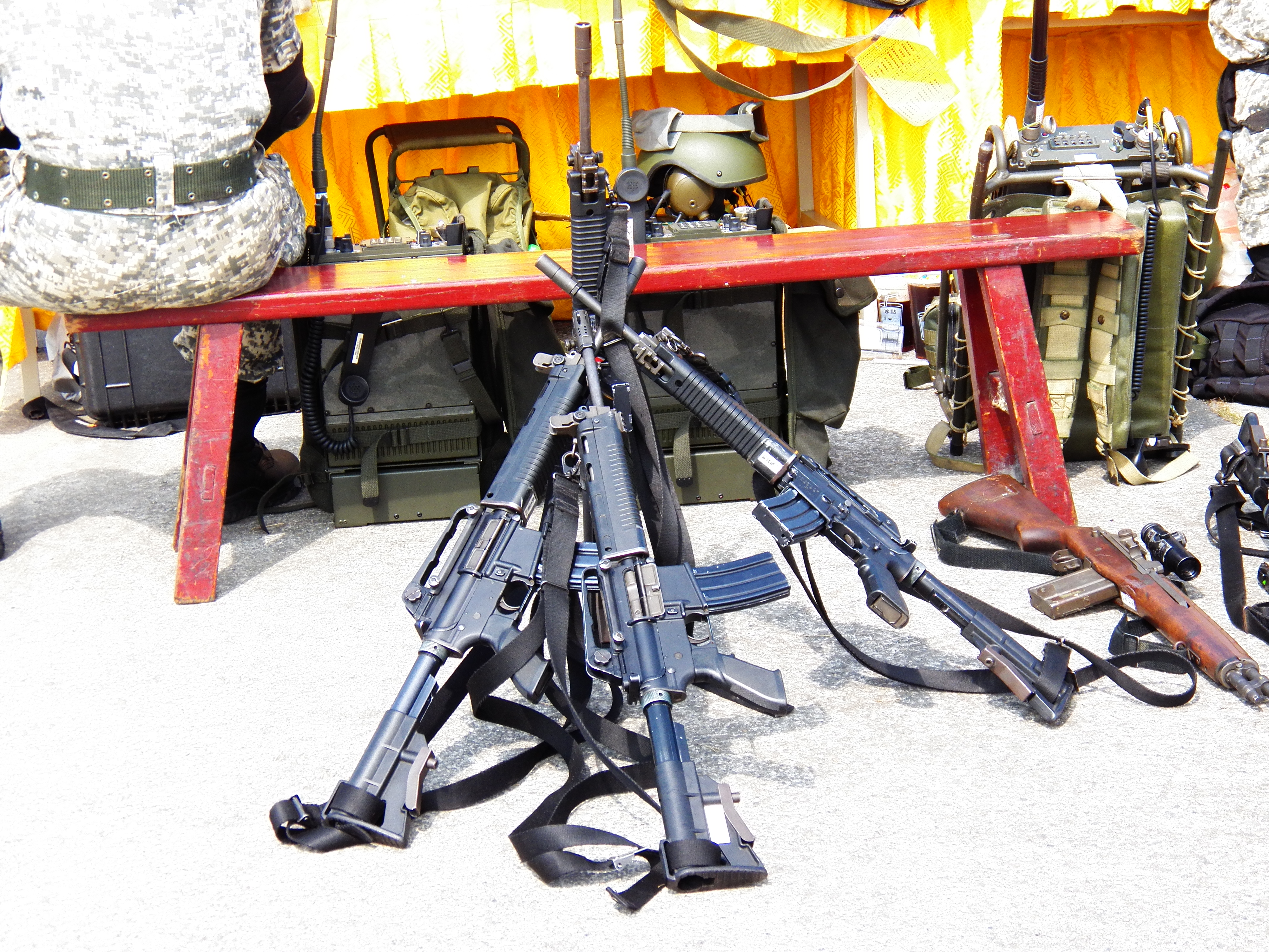 2012年陸軍步兵學校營區開放活動，特戰小組攤位後方準備取用的T91戰鬥步槍槍架。